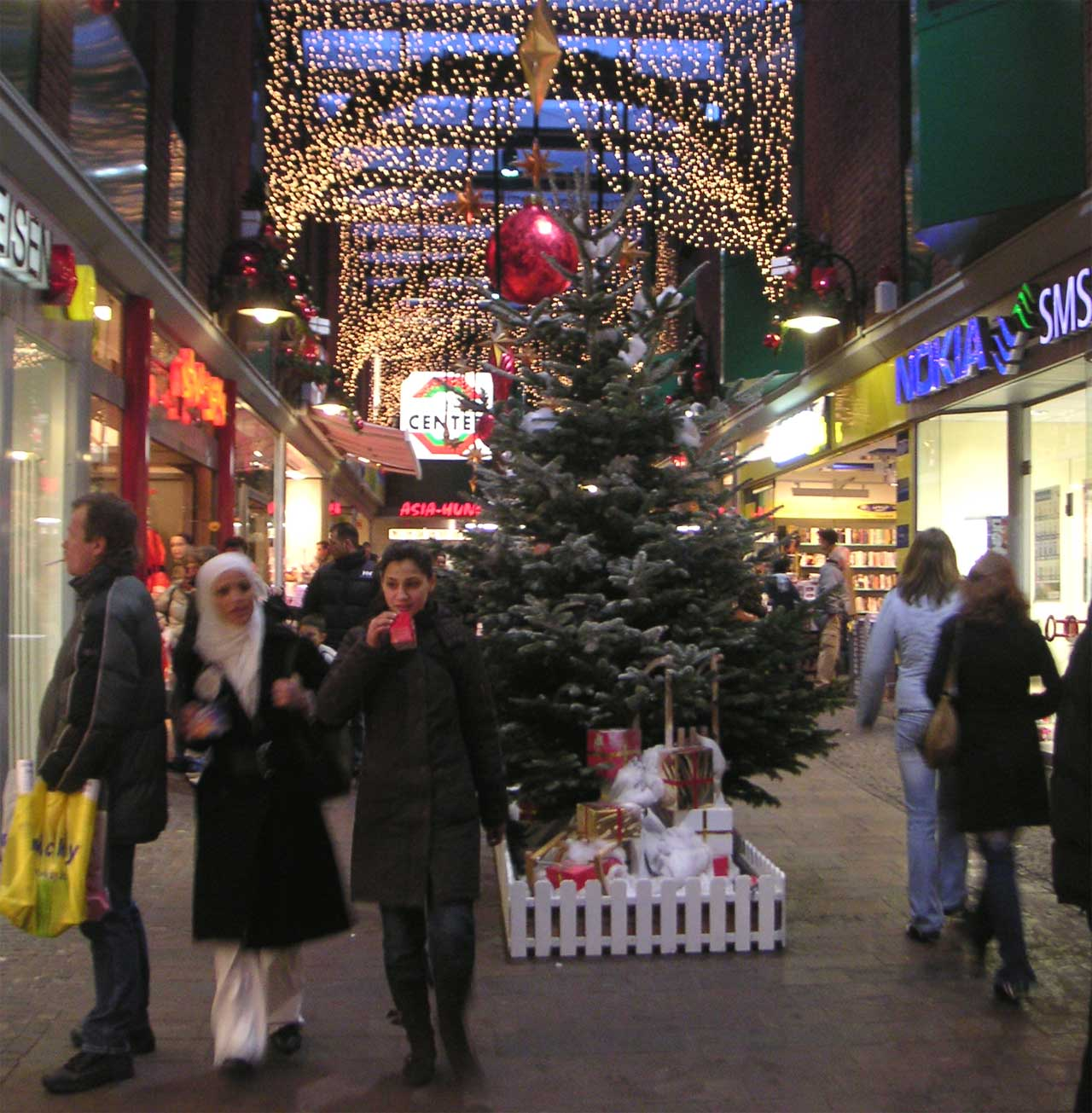 Beschreibung: Das Bild zeigt das Bahnhofcenter Gelsenkirchen an einem Abend in der Weihnachtszeit. Description: In the picture you can see the Bahnhofscenter Gelsenkirchen, a mall near the mainstation Gelsenkirchen. Quelle/Source: Fotografiert am 17. Dezember 2005 Fotograf: Marc Schuelper